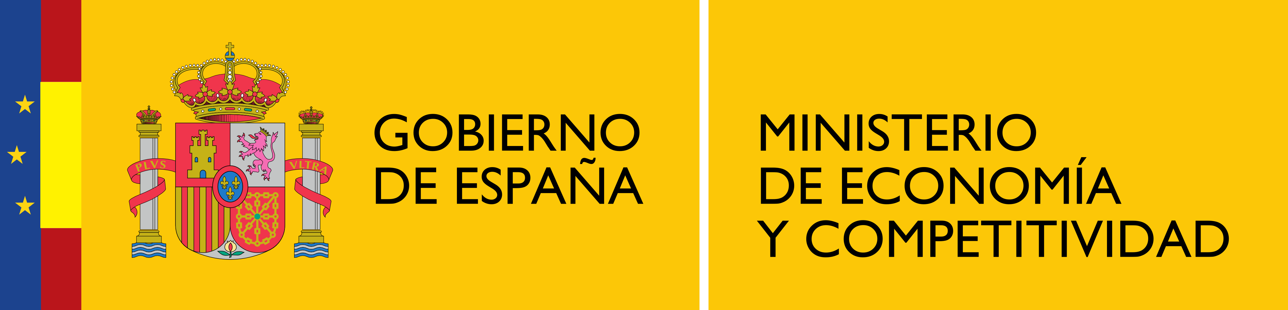 Logotipo del Ministerio de Economía y Competitividad